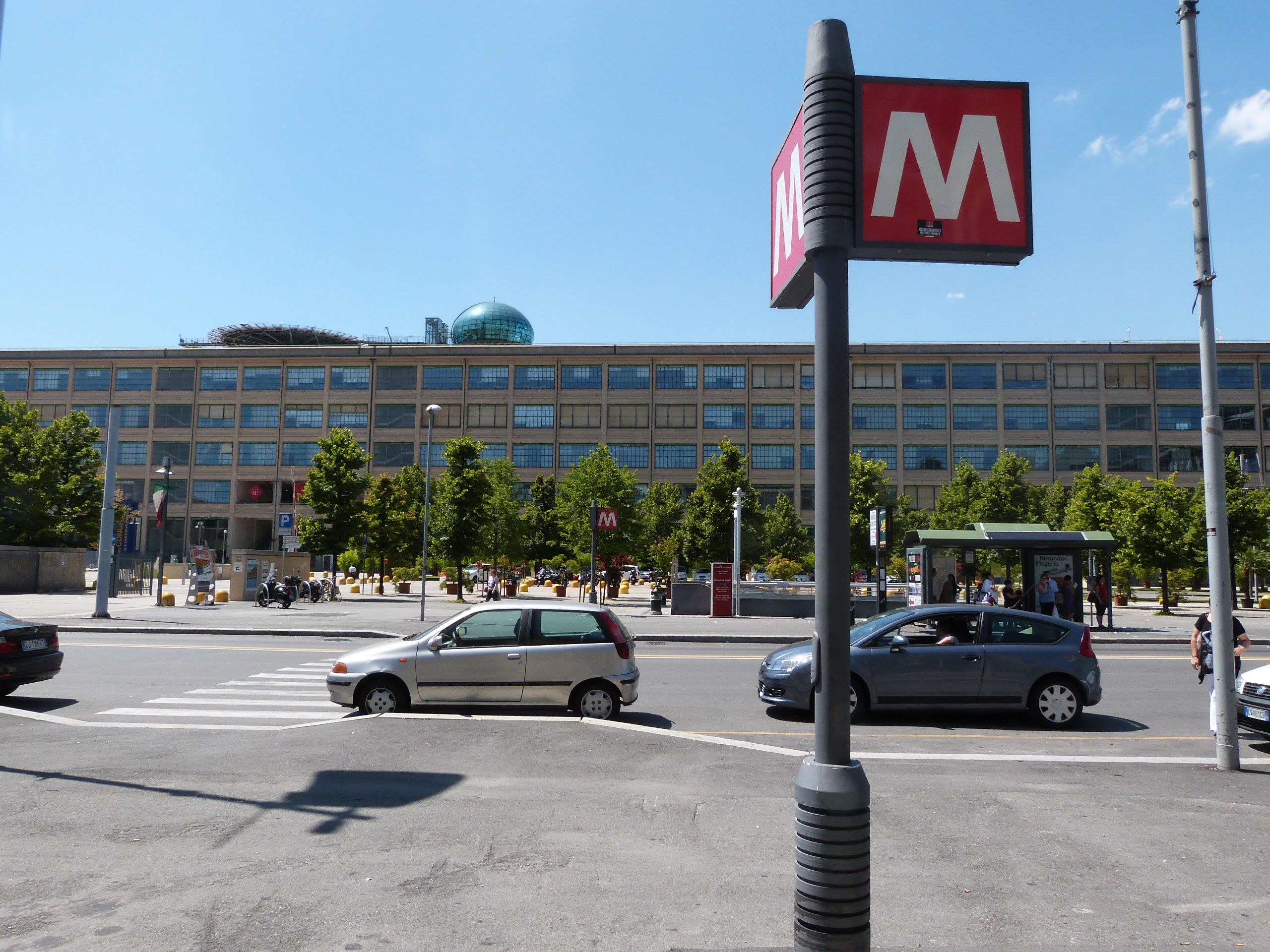 Stazione Lingotto della metropolitana di Torino